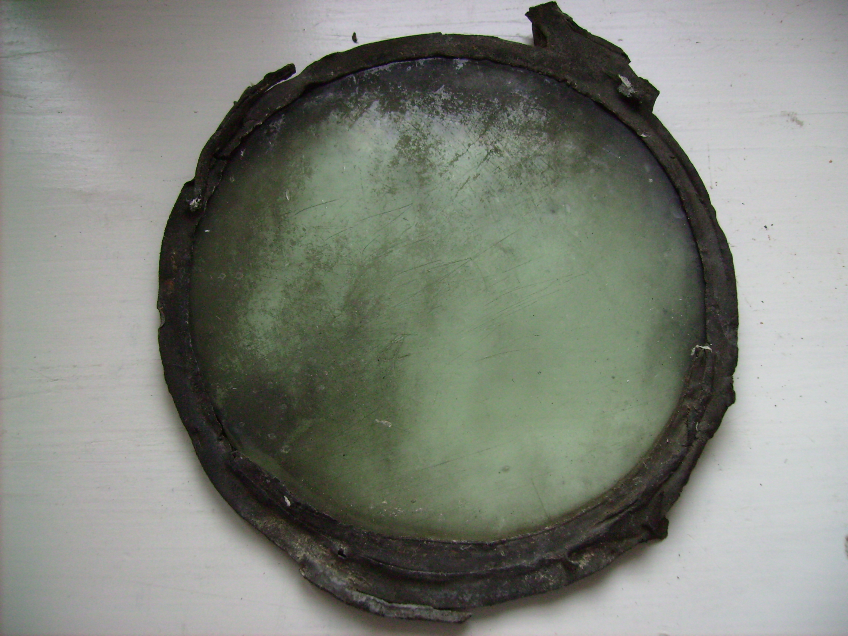 Butzenscheibenfund im Haus des 16. Jh.